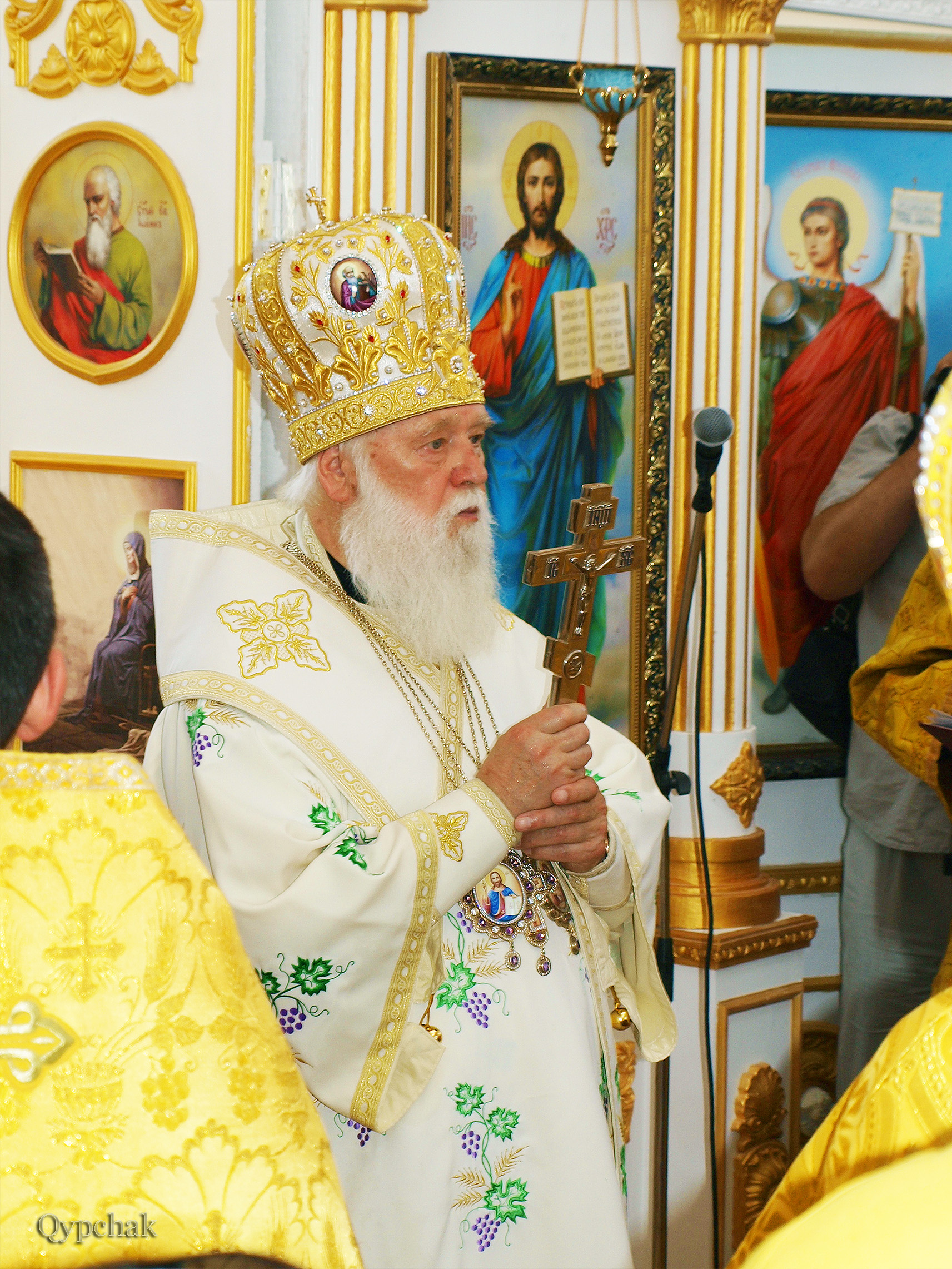 Патріарх УПЦ КП Філарет на освяченні Троїцького собору (Луганськ)